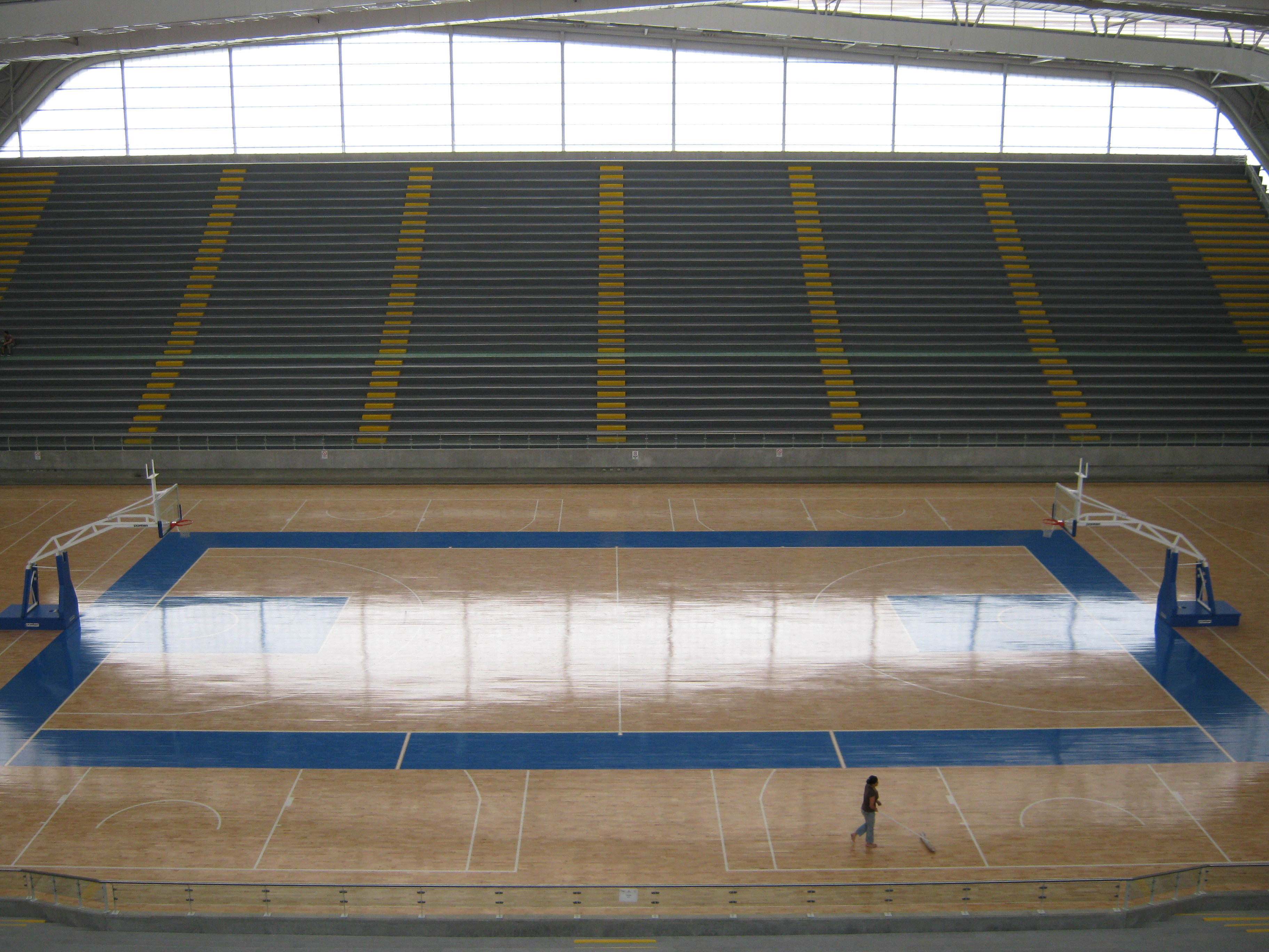 Interior del Coliseo de Baloncesto Iván de Bedout, en la Unidad Deportiva Atanasio Girardot. Medellín. Colombia.